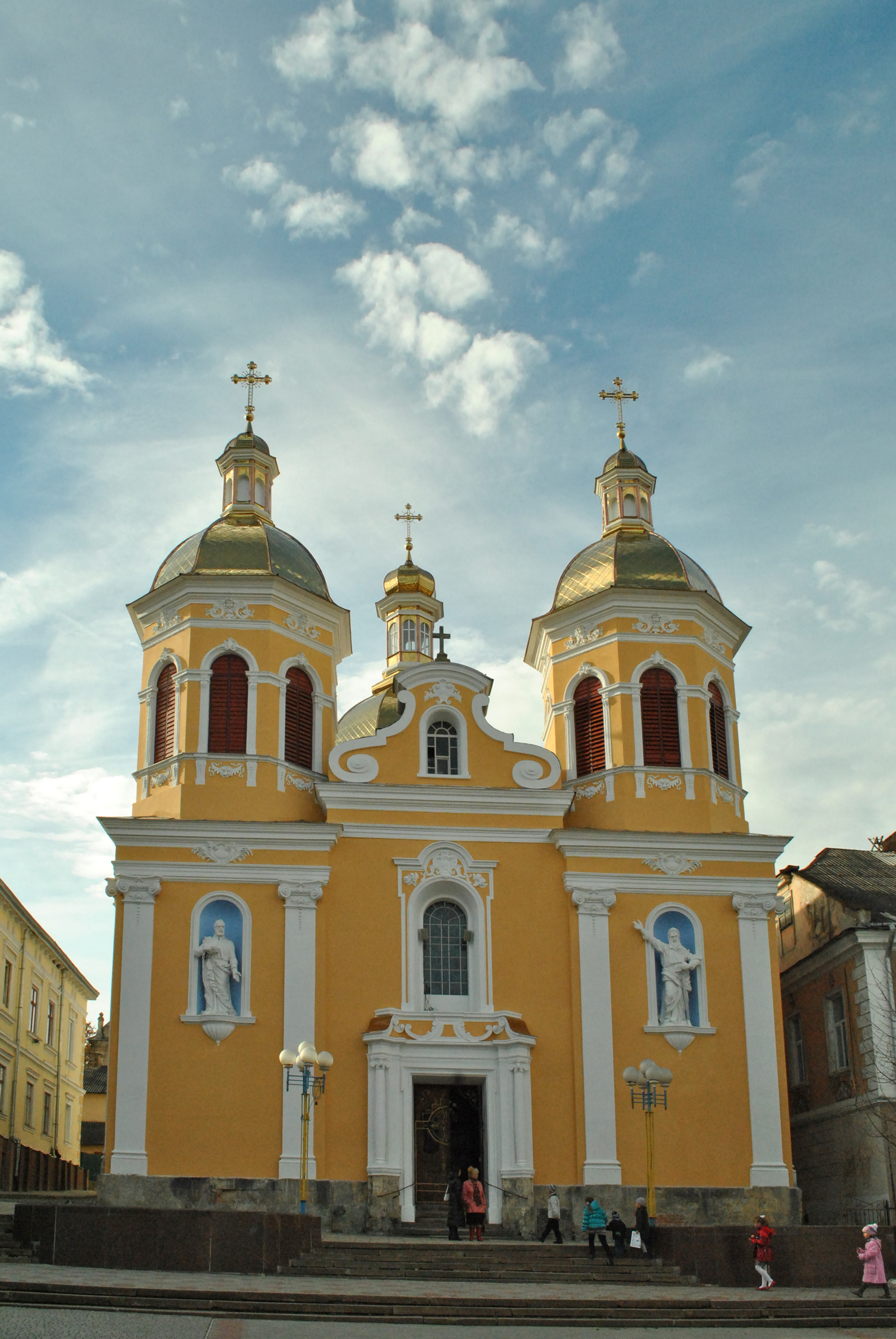 Церква Пресвятої Трійці (мур.) на пл. Ринок, 12 у Бережанах Тернопільської області.